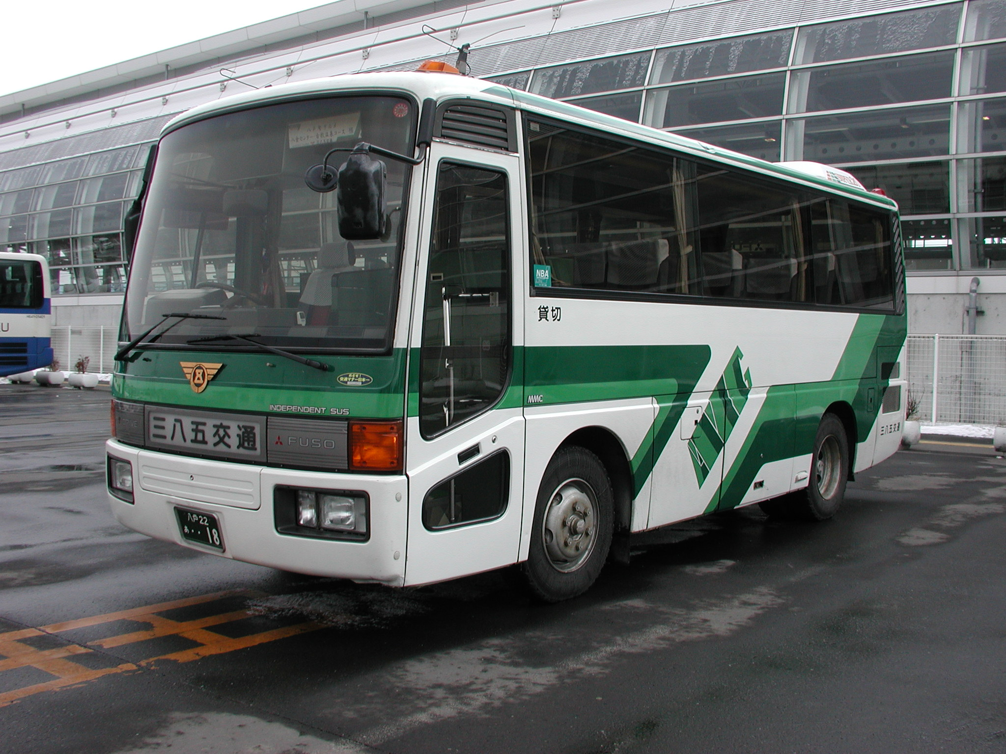 三八五交通（青森県ja:八戸市）：三菱ふそう・エアロミディMJ（観光型） 八戸駅西口にて